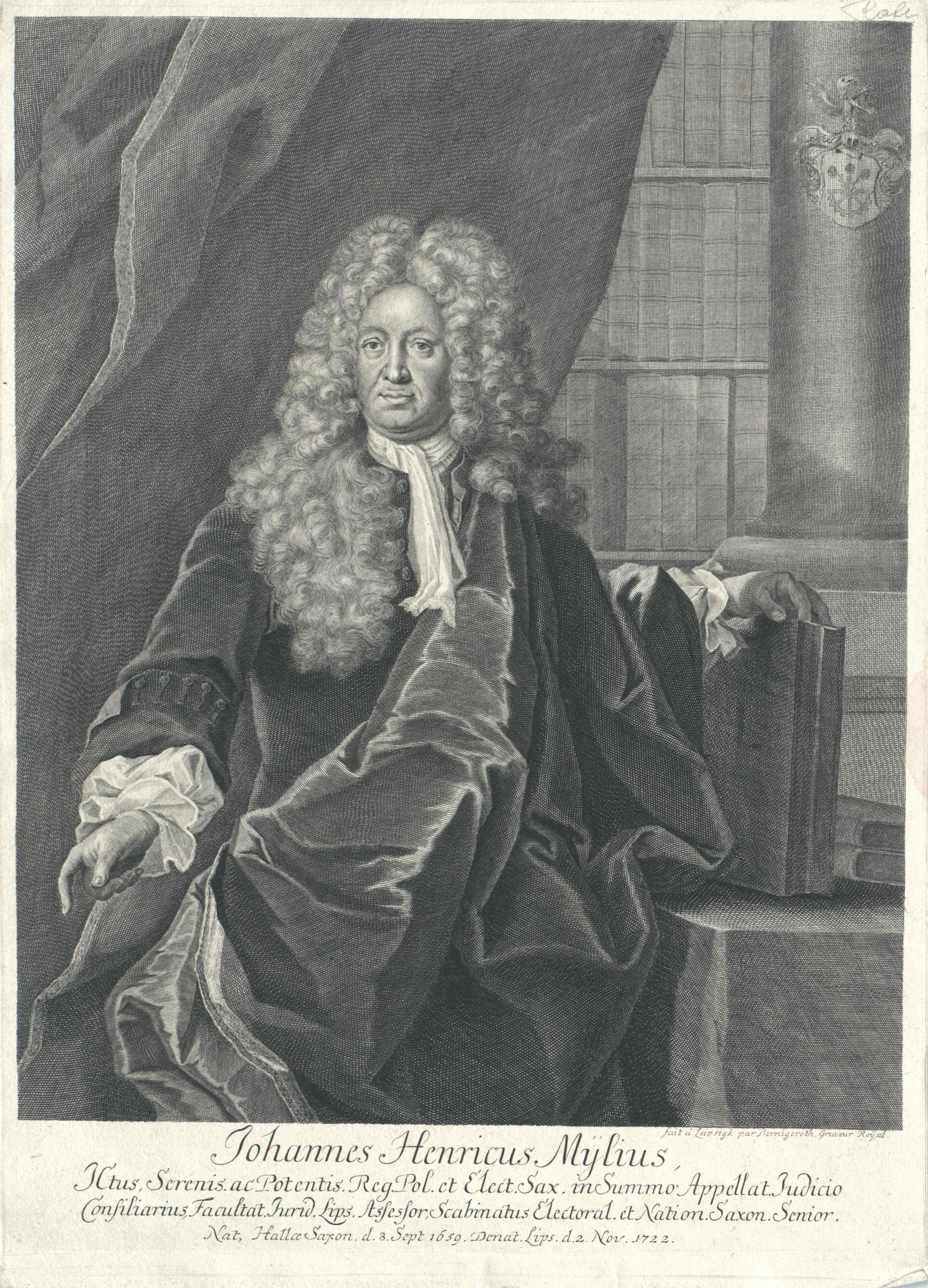 Bildnis Johann Heinrich Mylius d. Ä.; Wien, Österreichische Nationalbibliothek, Bildarchiv und Grafiksammlung, Porträtsammlung, Inventar-Nr. PORT_00139962_01